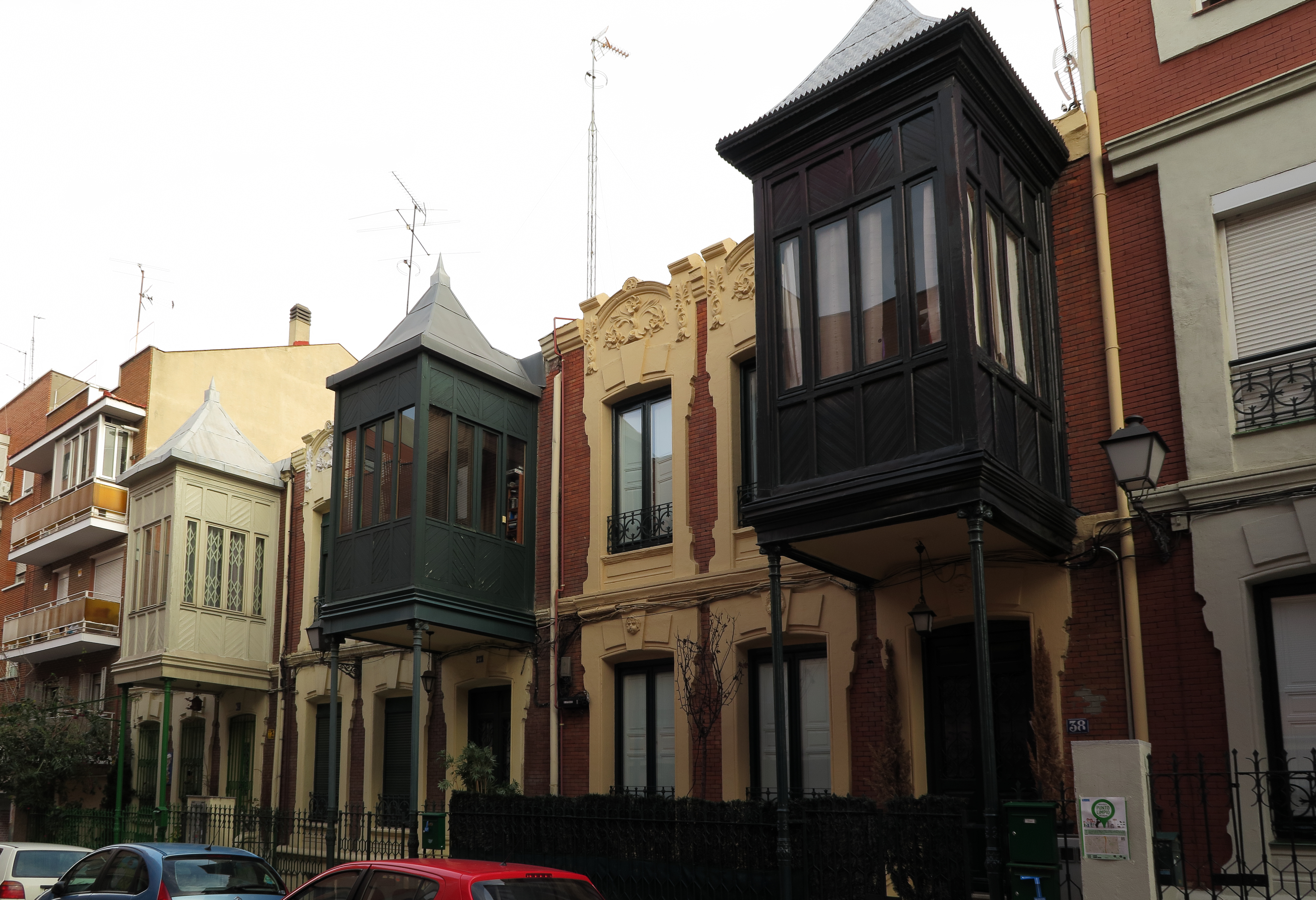 Madrid Moderno, numeros 38, 40 y 42